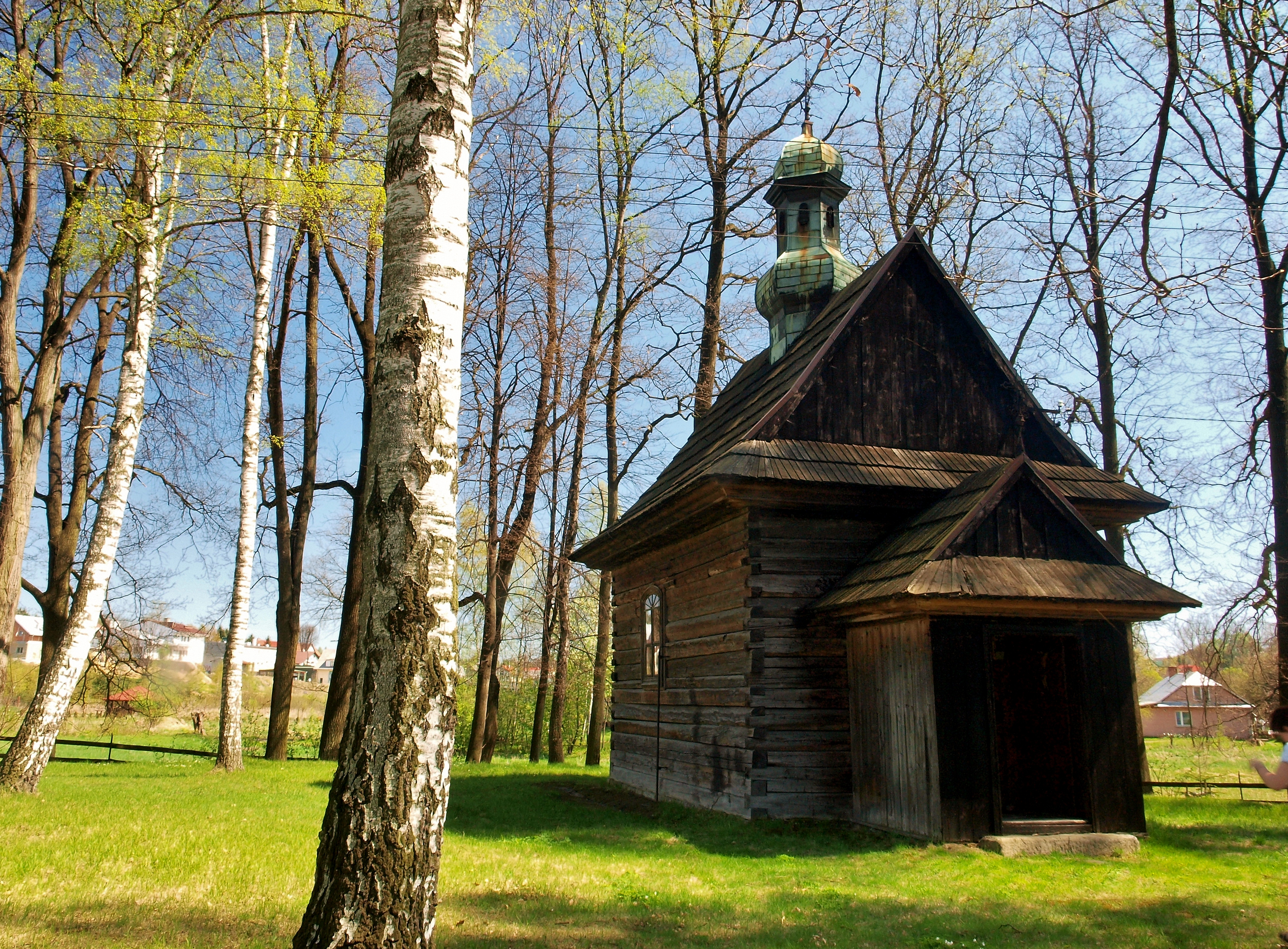 XVI-wieczny kościół św. Marcina w Sieprawiu